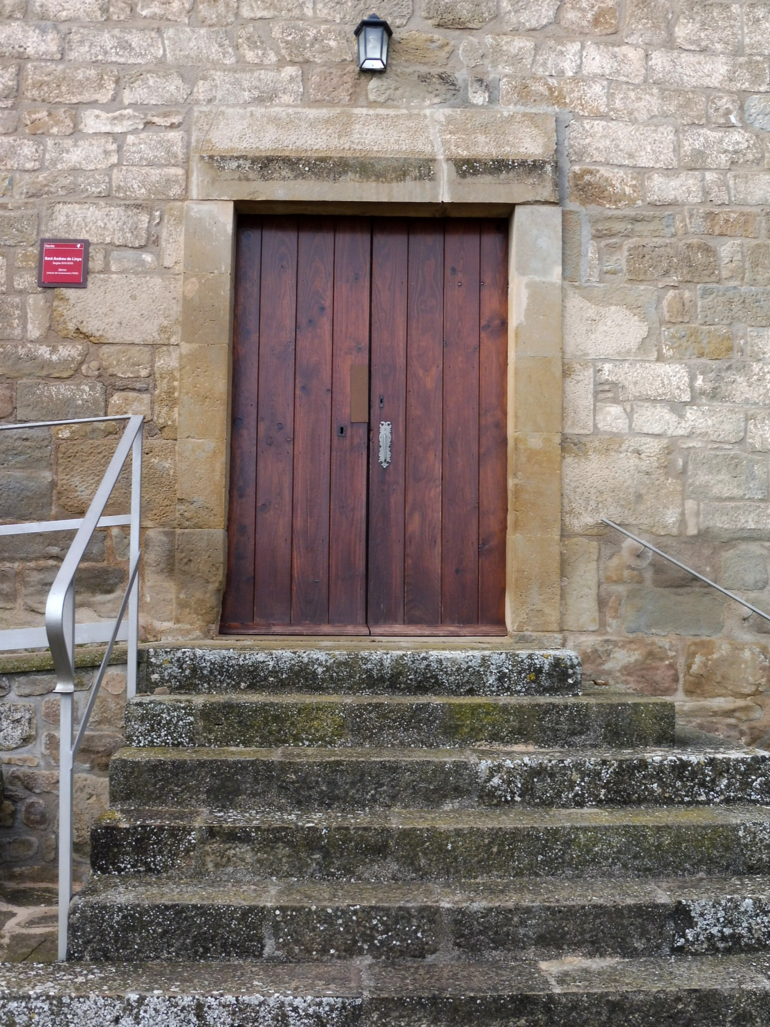 Església parroquial de Sant Andreu de Linya (Navès): Portal